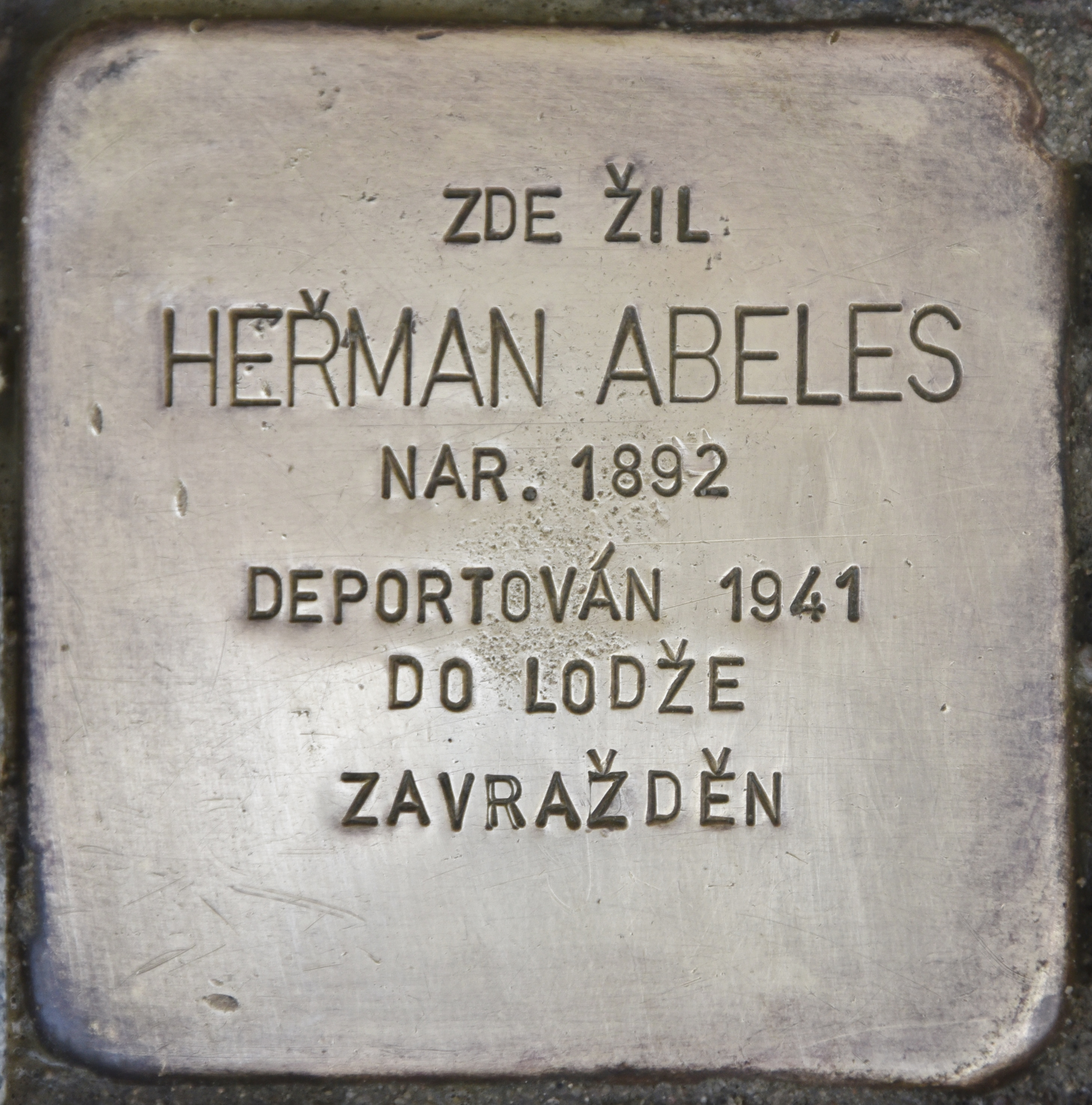 Stolperstein für Herman Abeles